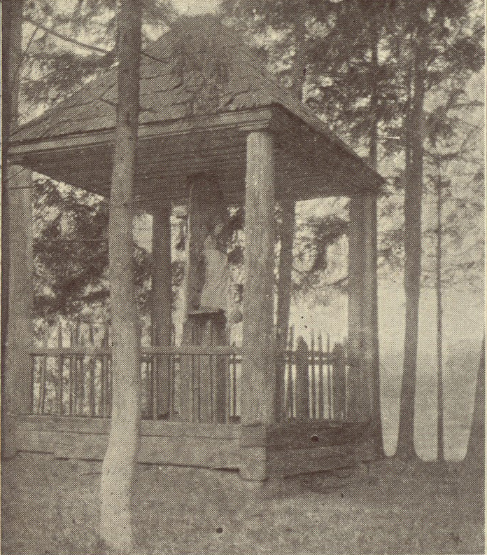 Беларуская (тарашкевіца): Грэбень (Hrebień). Капліца